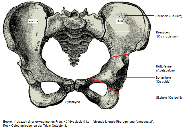 Beckenskizze (Gray) mit HD links und eingezweichneten DBO-Linien